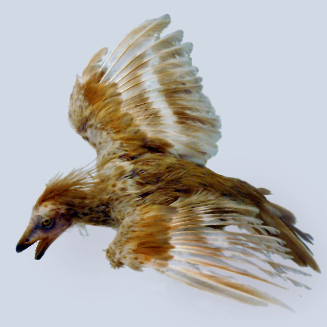 Reconstrucción de un Iberomesornis expuesto en el Museo Nacional de Ciencias Naturales de Madrid